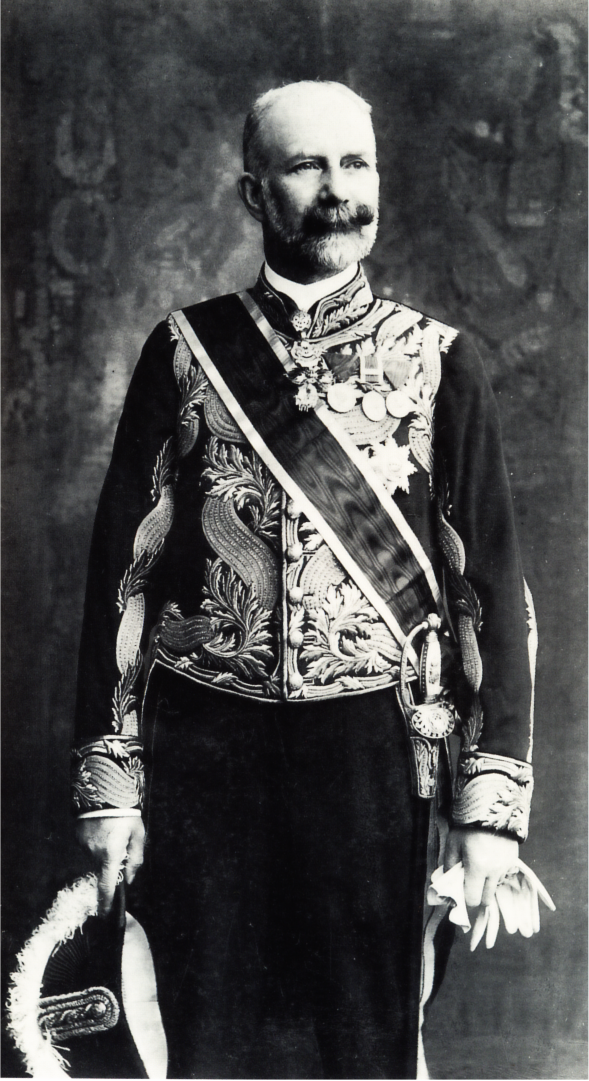 Obersthofmeister des österreichischen Kaiserhofes Alfred Fürst von Montenuovo, in der Gala-Uniform für Oberste Hofchargen